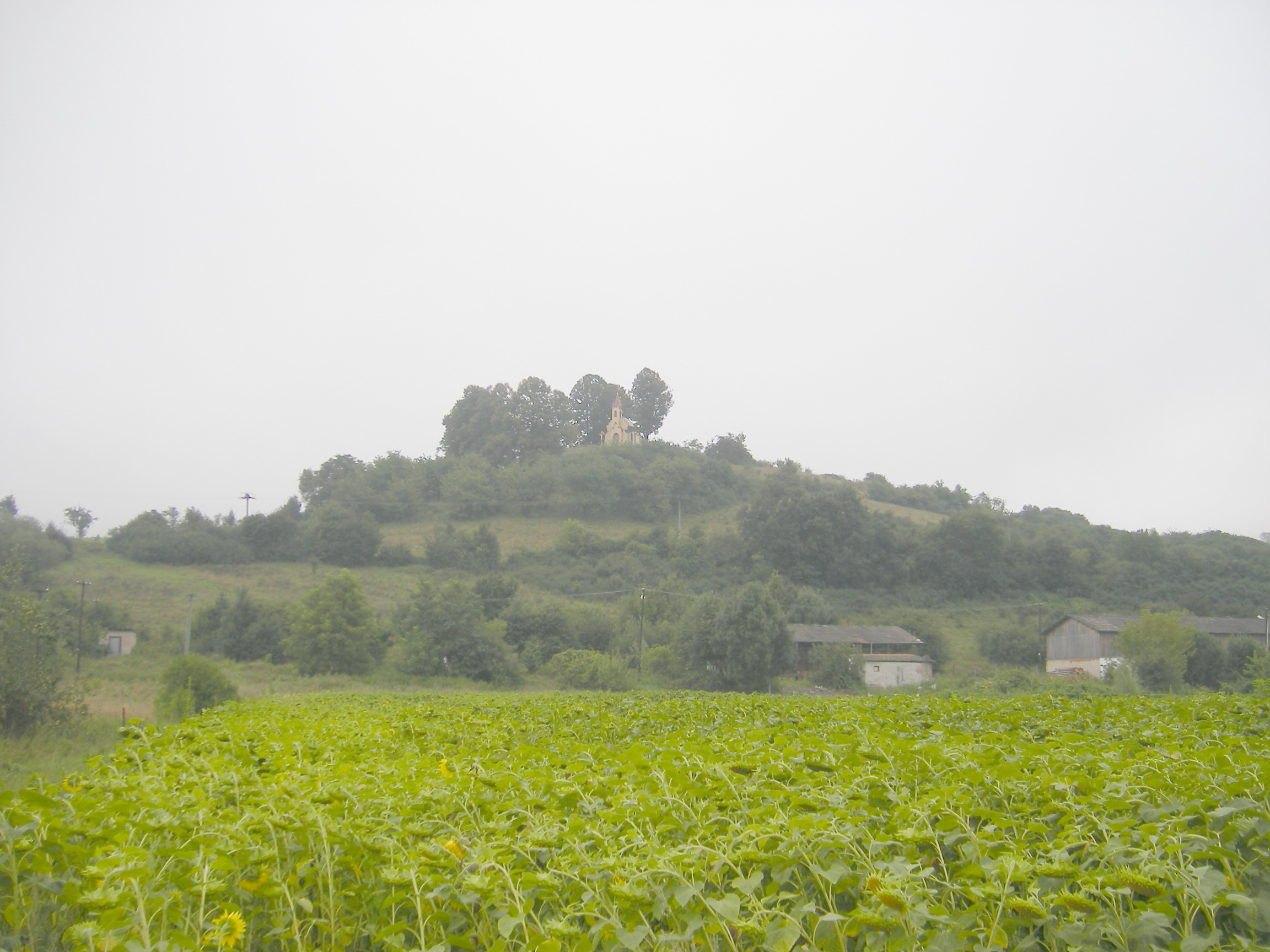 Rudno nad Hronom (okres Žarnovica)